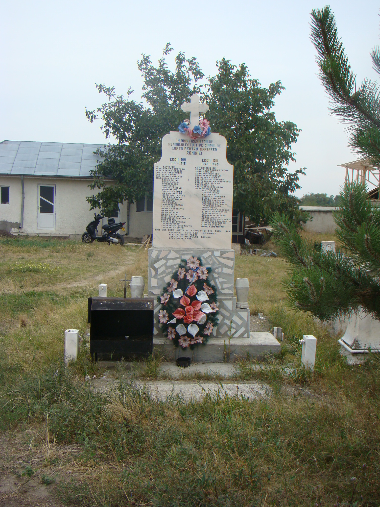 Crucea Eroilor, Ramnicelu, BZ